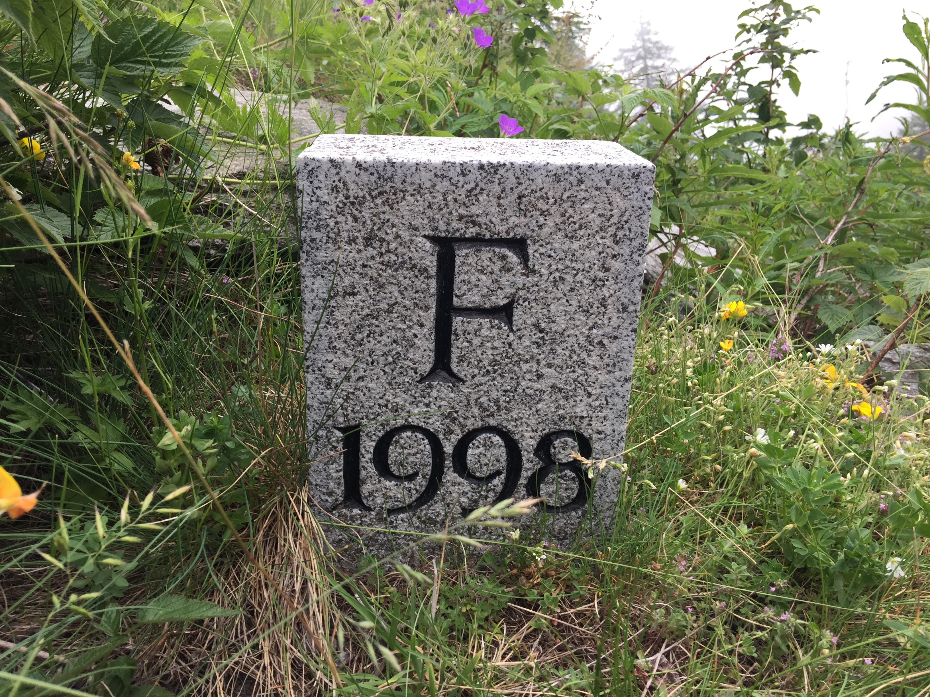 Borne Franco-Italienne dans la region du Mont-Cenis au pied du Mont Giusalet